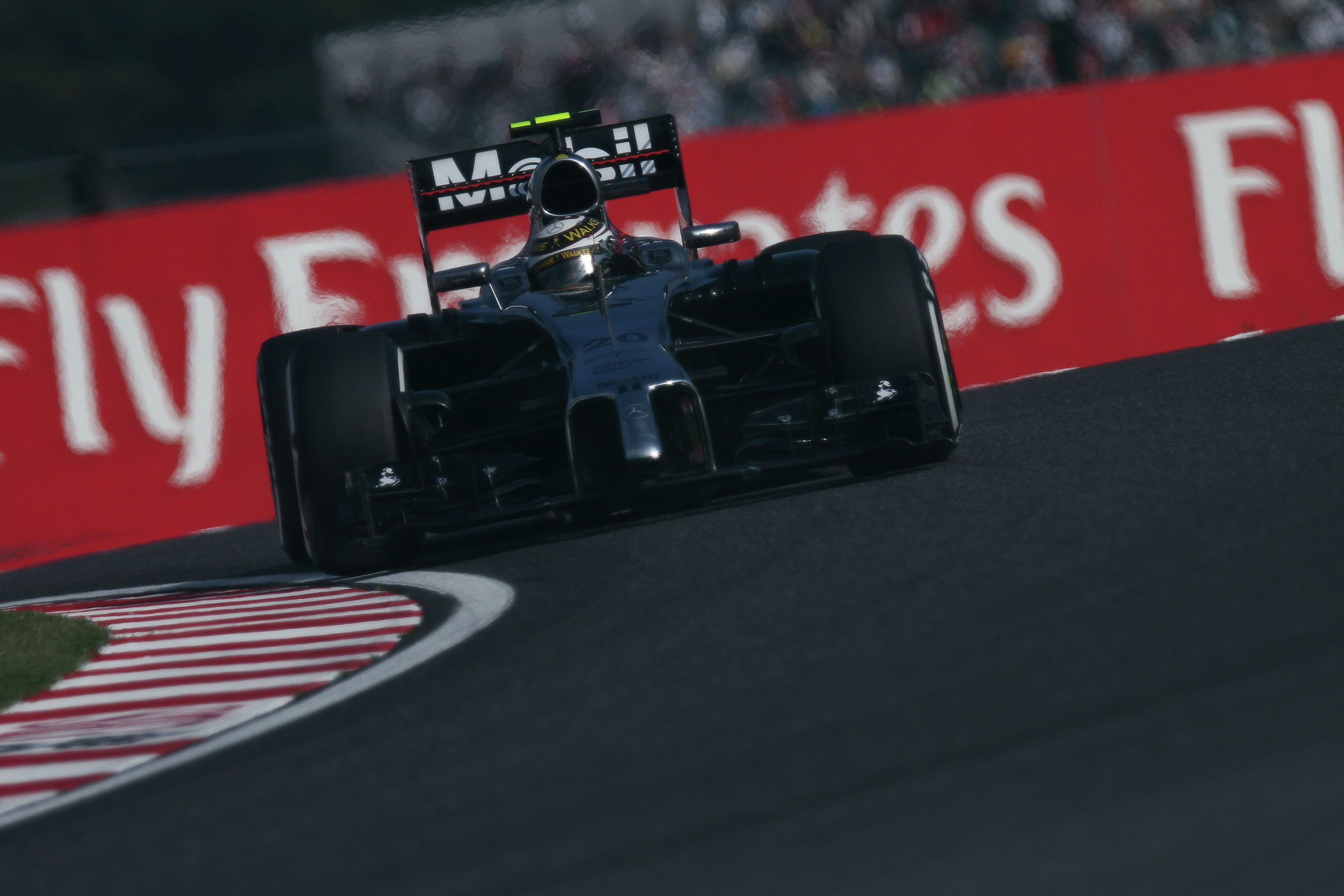 2014.10.3 F1 Rd.15 Suzuka FP2, McLarren Mercedes (MP4-29) 20 ケビン・マグヌッセン [IMG_9461ks]